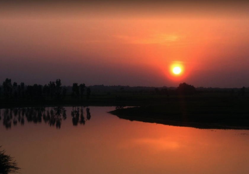 ಕನ್ನಡ: ಹೊಸರಾಮನಹಳ್ಳಿಯಲ್ಲಿ ಹರಿಯುವ ಲಕ್ಷ್ಮಣತೀರ್ಥ ನದಿಯ ವಿಹಂಗಮ ನೋಟ